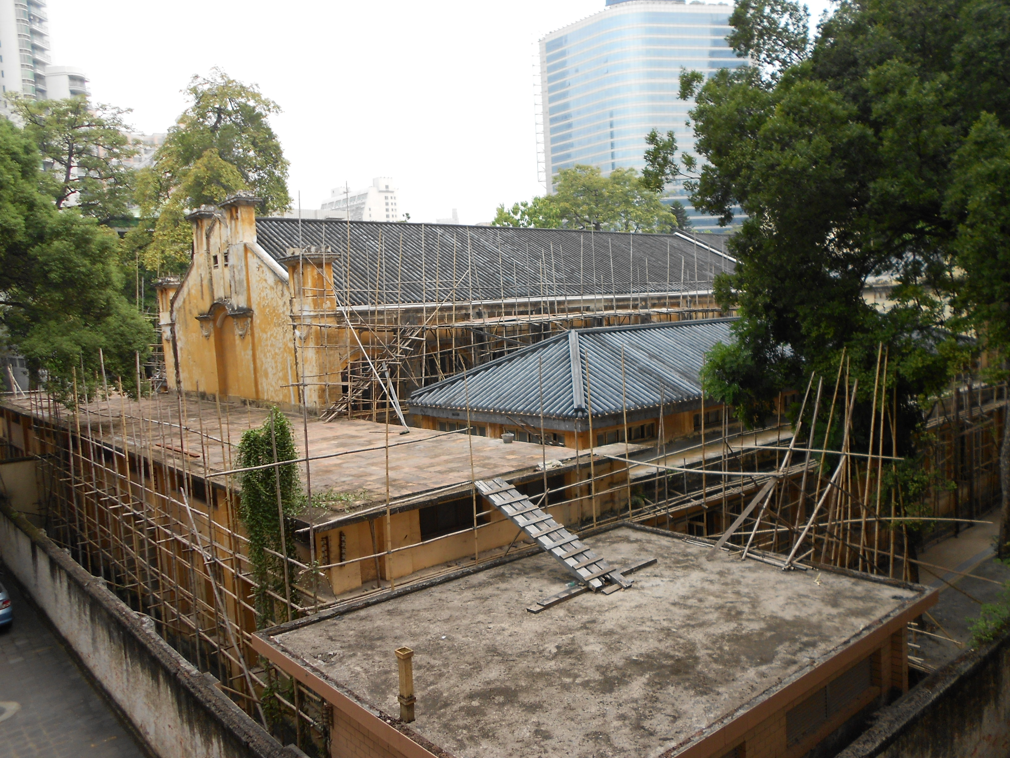 維修中的中國國民黨第一次全國代表大會舊址（後面）。